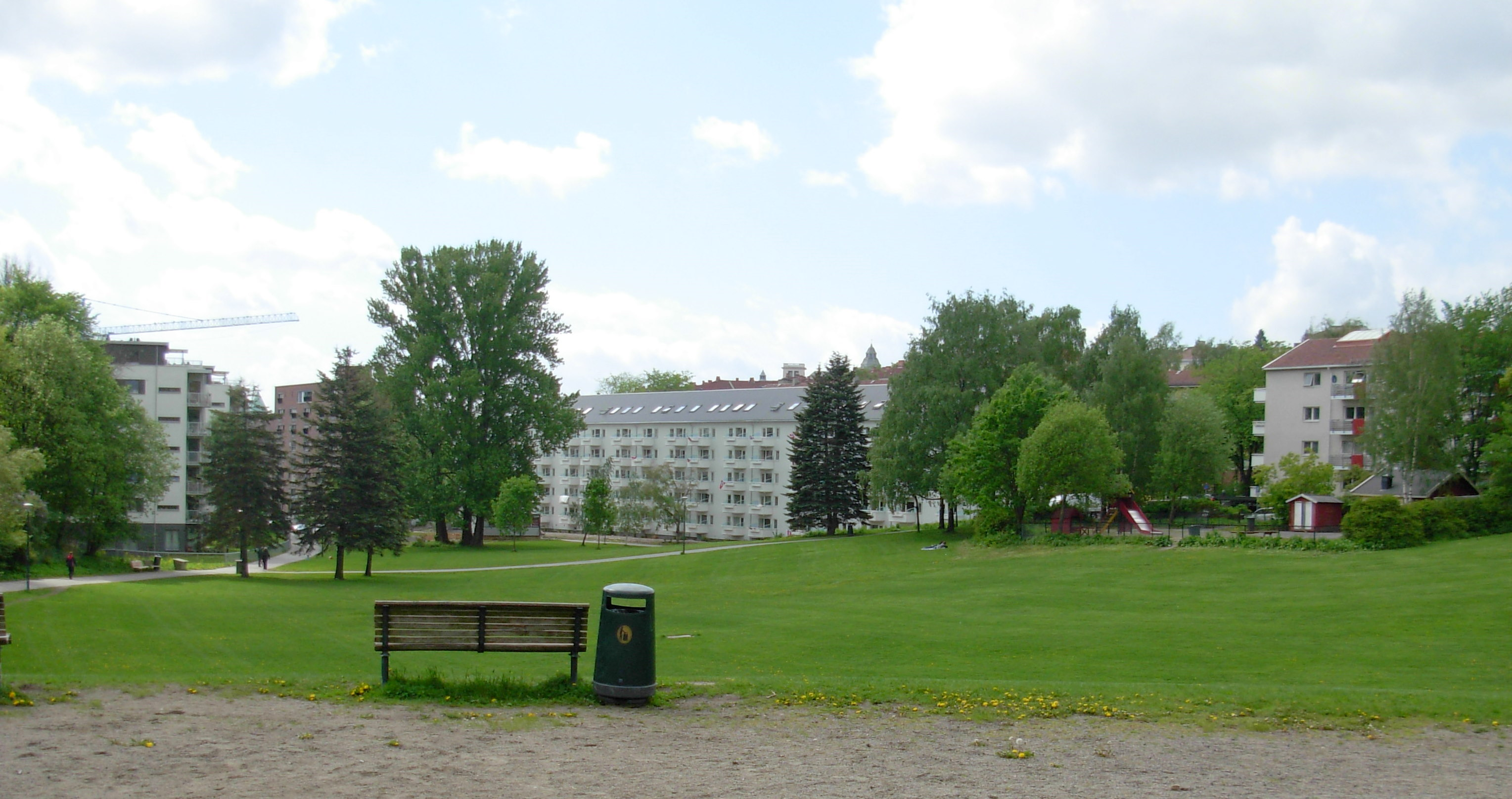 Iladalen park, mot syd